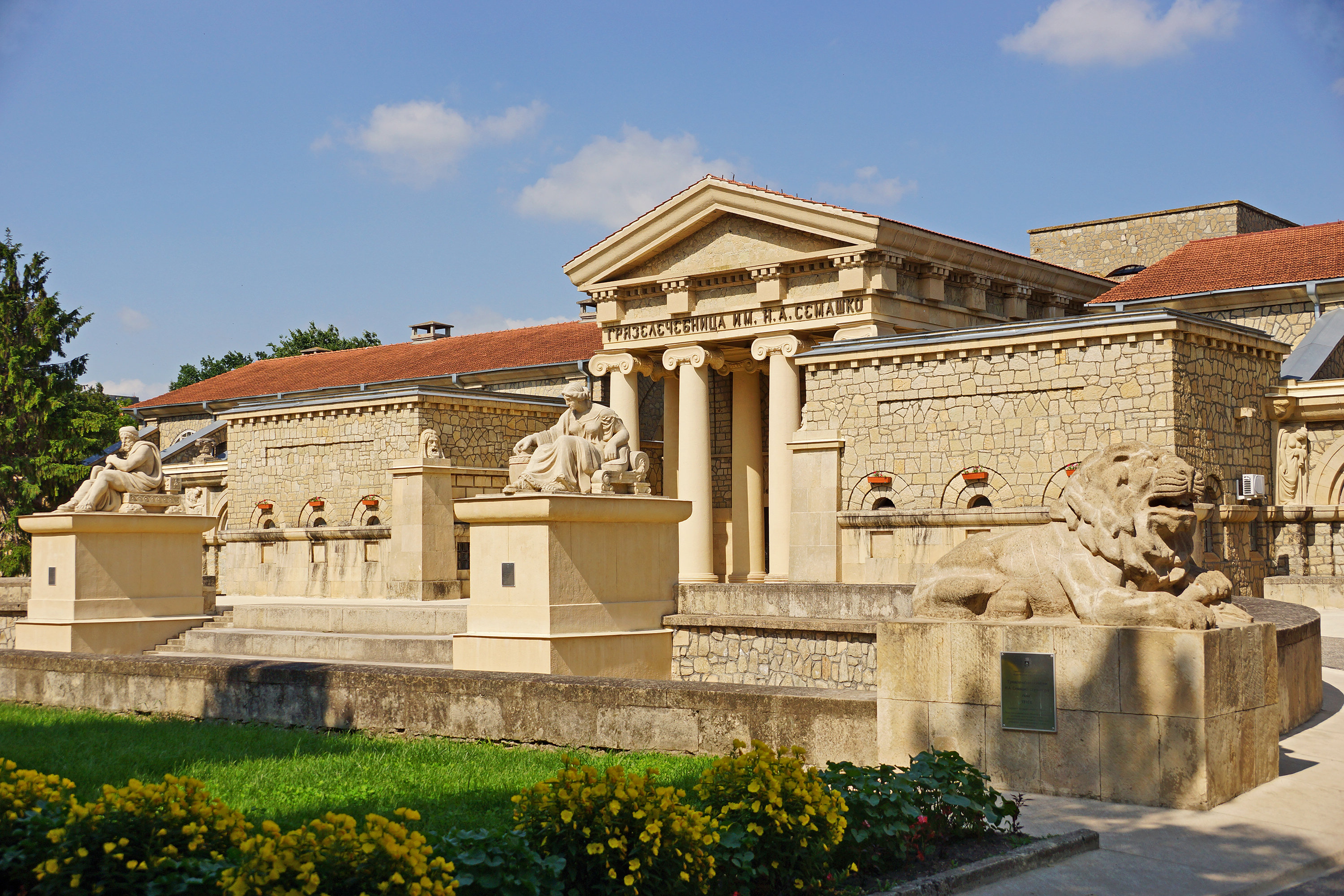 Грязелечебница имени Н.А. Семашко: улица Семашко, 4 (10), Ессентуки, Ставропольский край